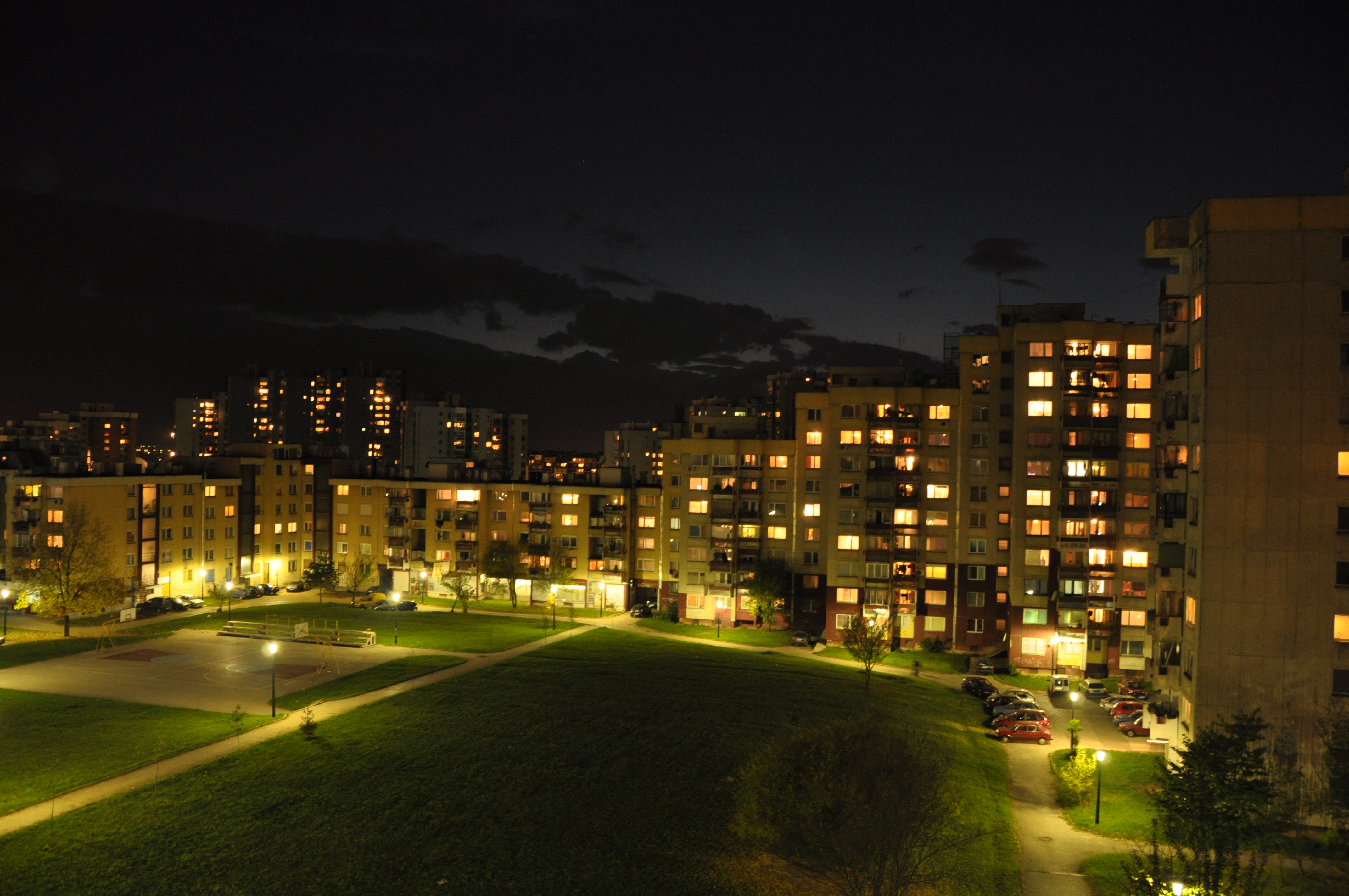 Alipašino polje